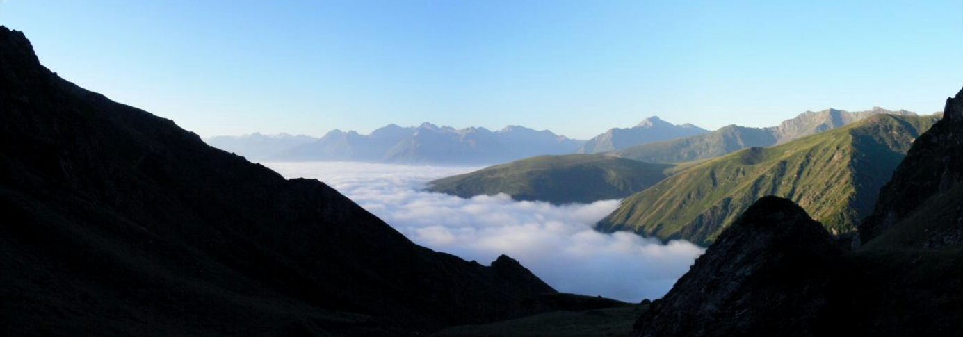 Vue de la vallée d'Aure sous une mer de nuages